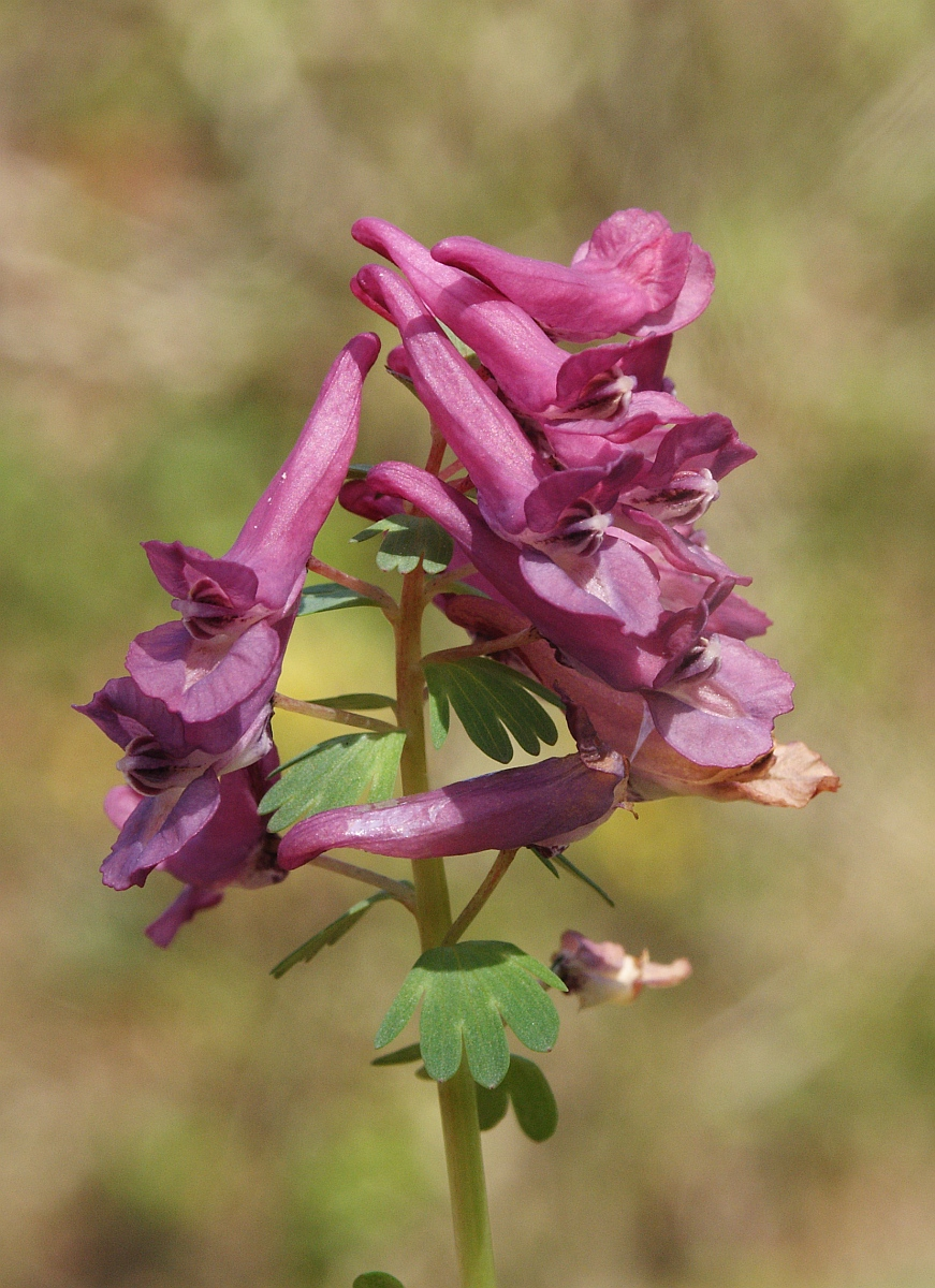 Corydalis solida, in meinem Garten